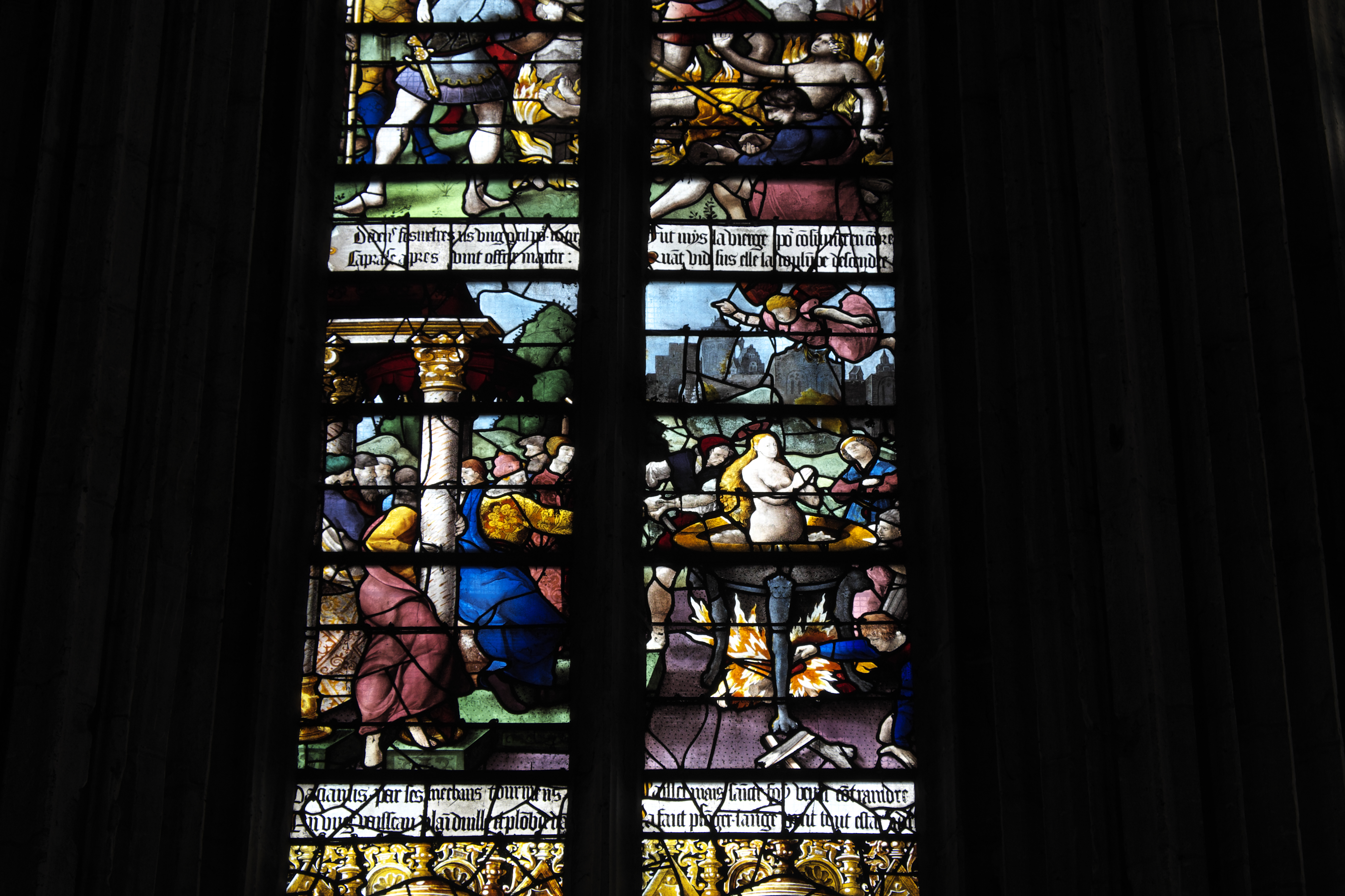 Katholische Kirche Sainte-Foy in Conches-en-Ouche im Département Eure (Haute-Normandie/Frankreich), Bleiglasfenster aus der 1. Hälfte des 16. Jahrhunderts im Chor; Darstellung: Martyrium der hl. Fides von Agen (Ausschnitt)